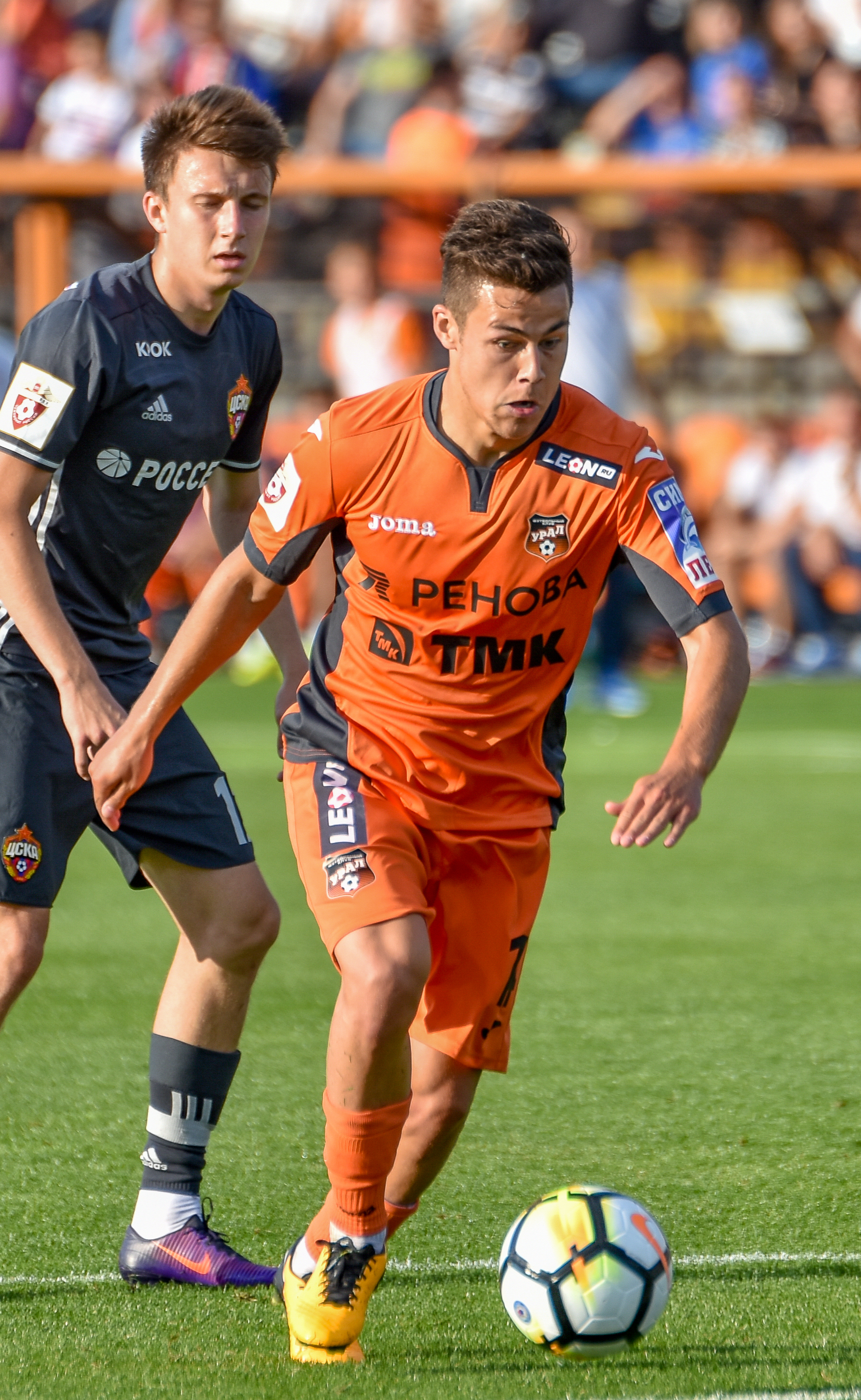 Матч ЧР 2017-2018. Урал - ЦСКА. 19.08.2017. СКБ-Банк Арена. Россия? Екатеринбург